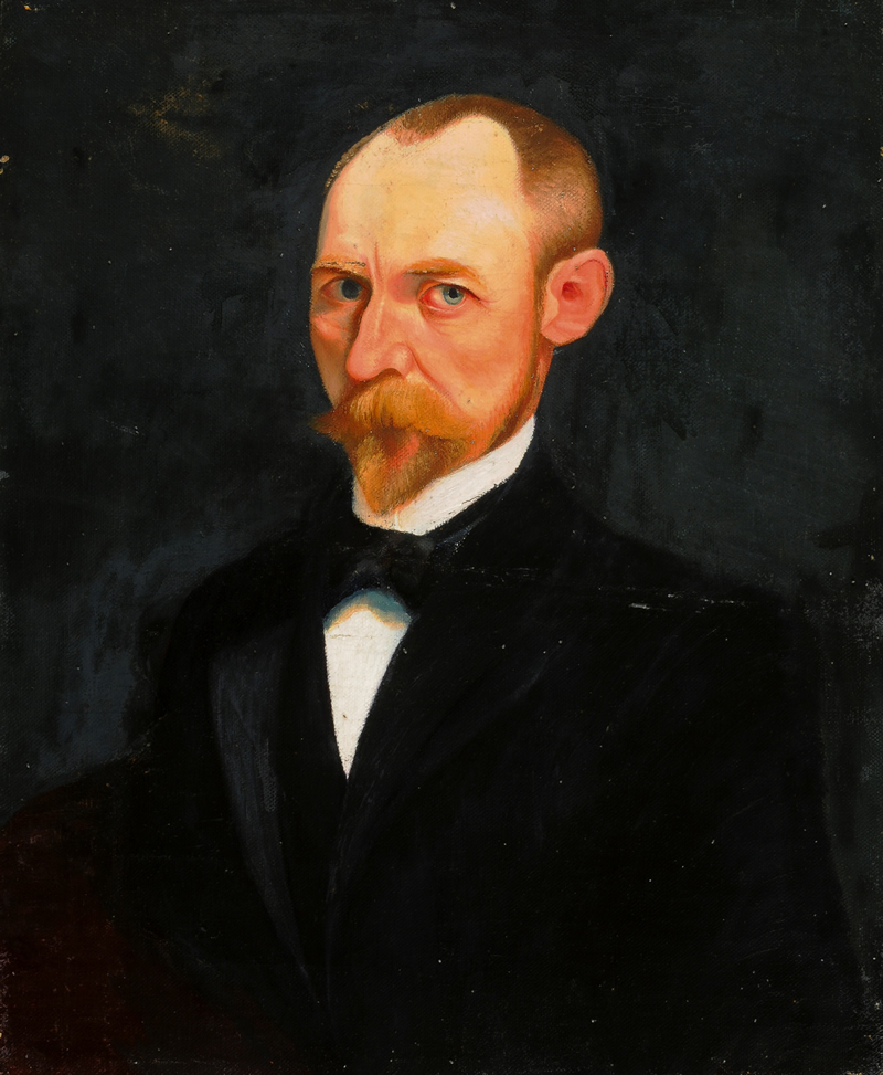 Hungarian: Önarckép